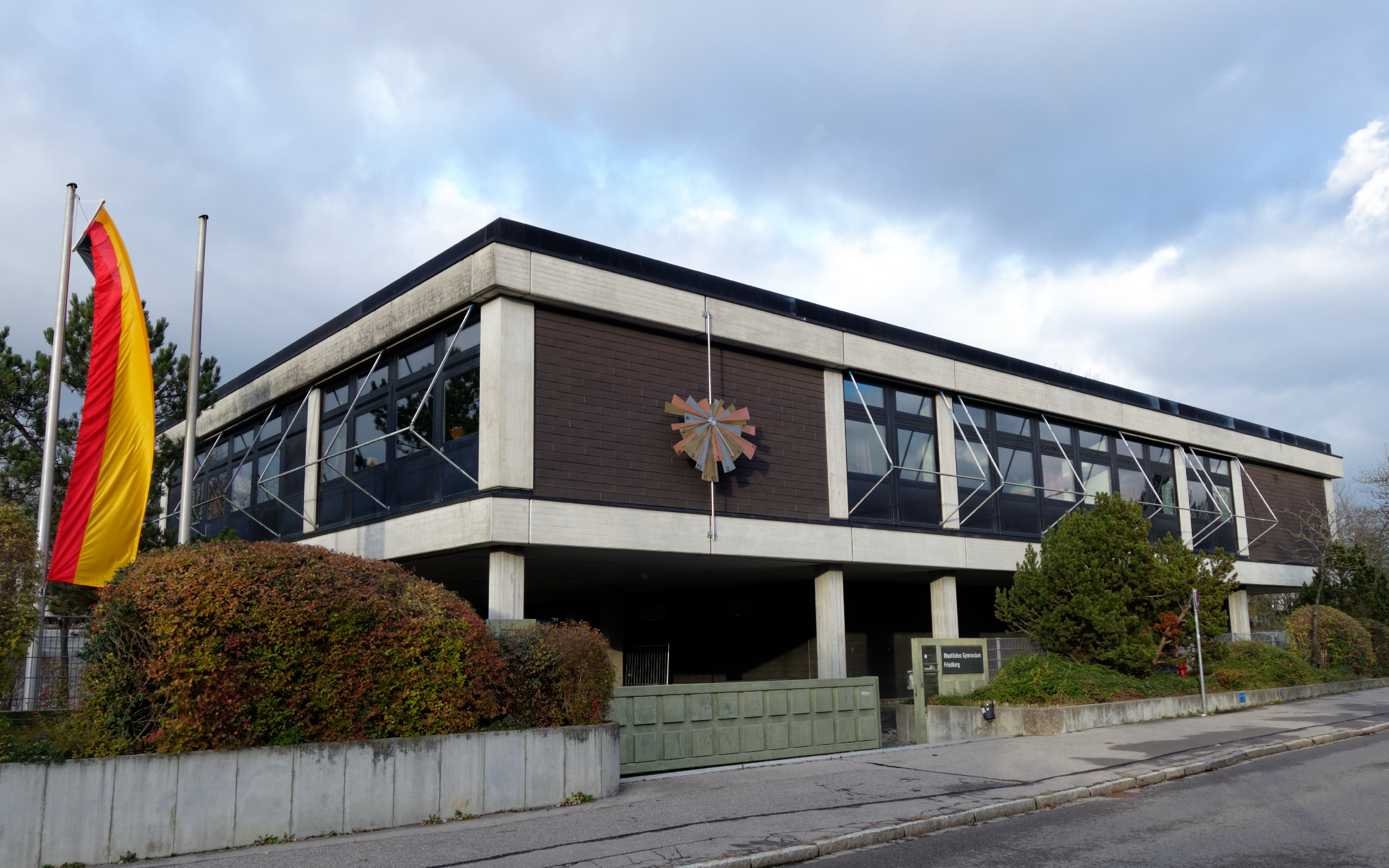 Staatliches Gymnasium Friedberg (Bayern)